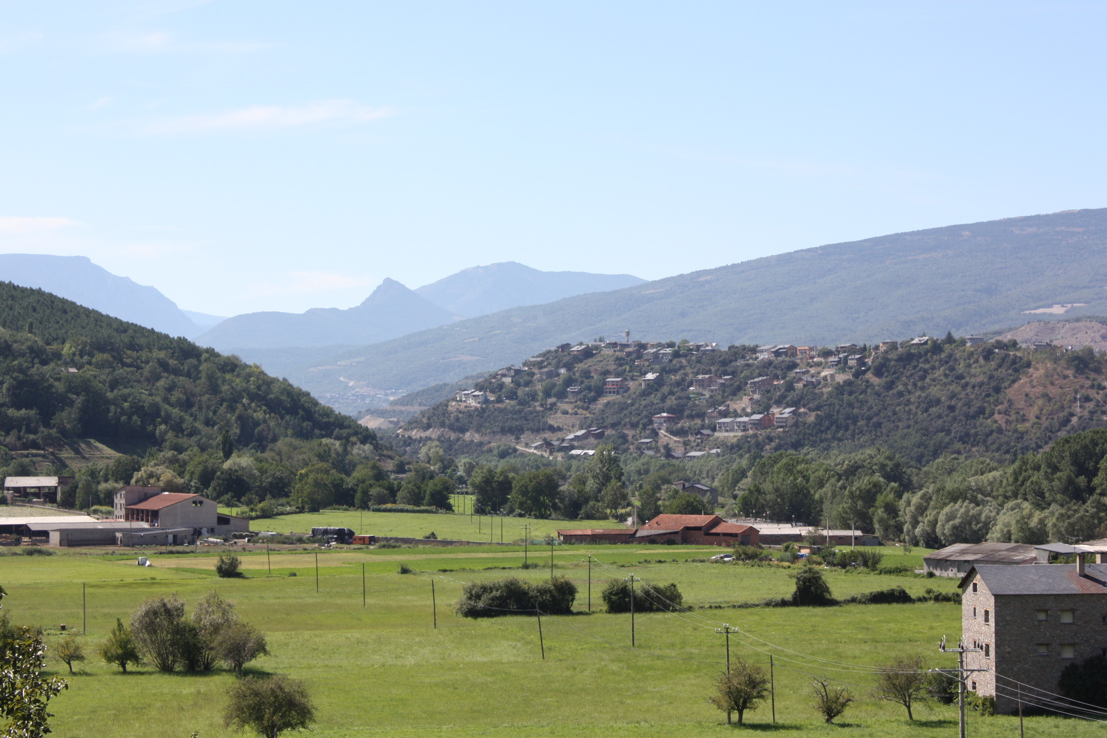 El Balcó del Pirineu, des dels Segalers (la Seu d'Urgell).